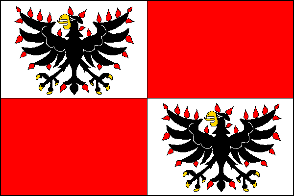 vlajka, Volyně, okres Strakonice